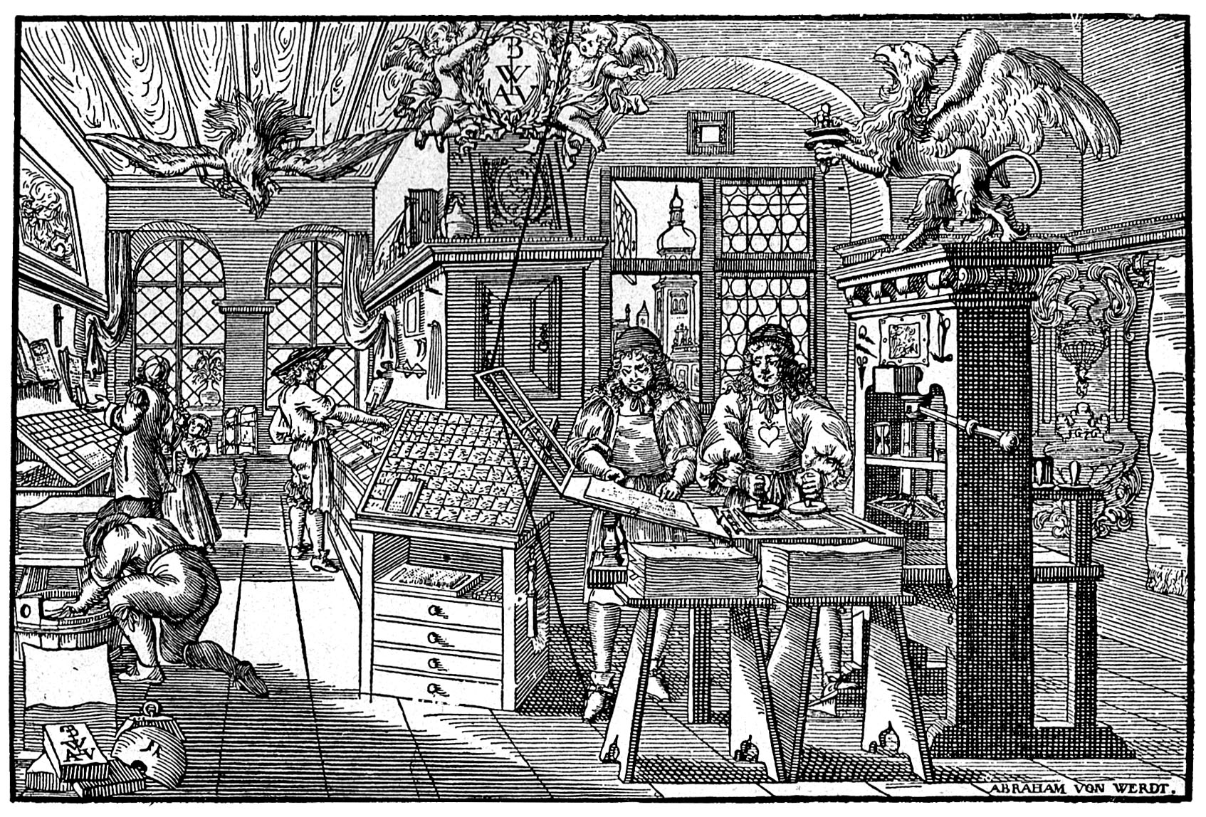 Atelier d’imprimerie, gravure sur bois par Abraham Van Werdt (XVIIe siècle)